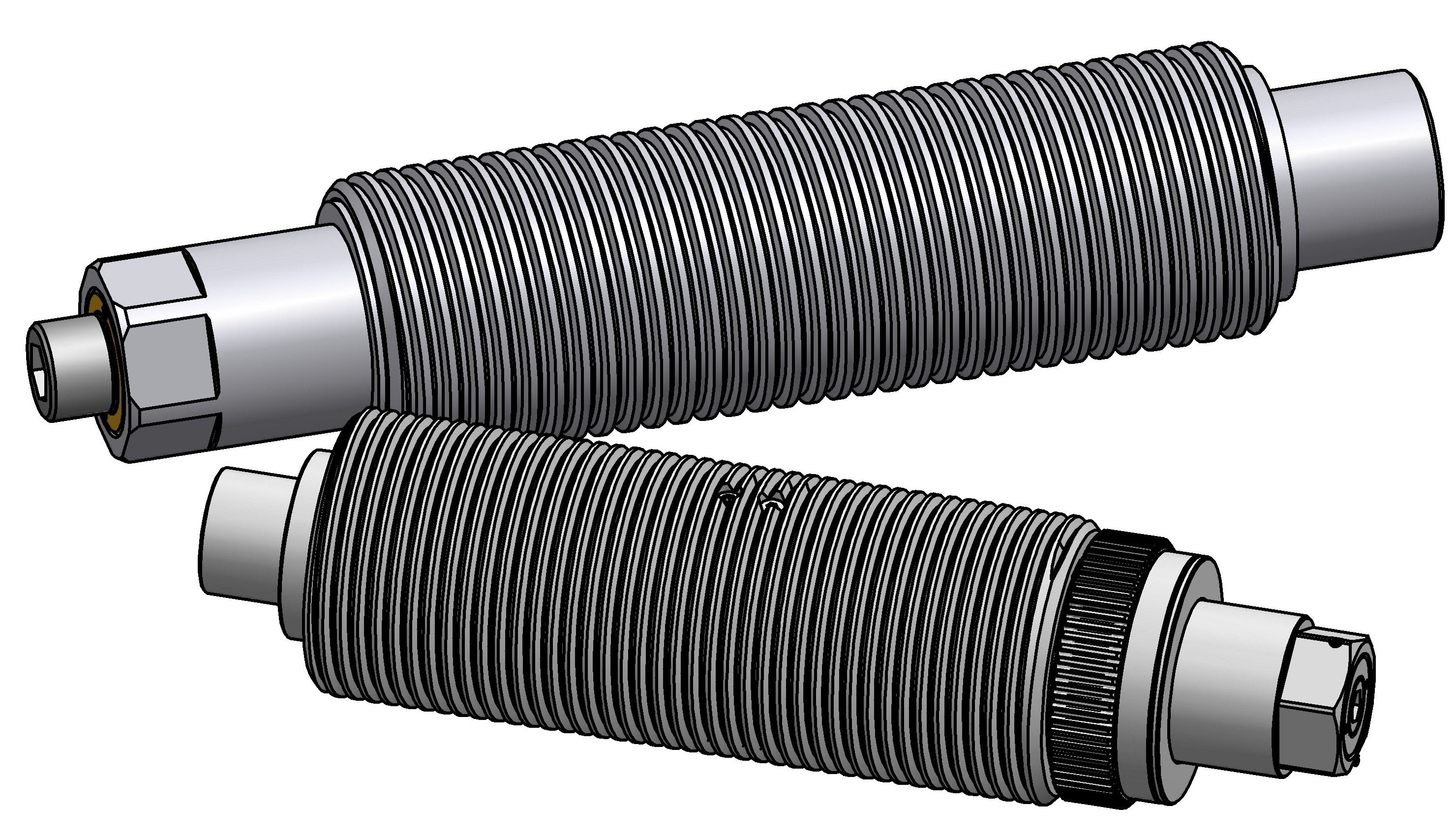 Kraftspannspindeln